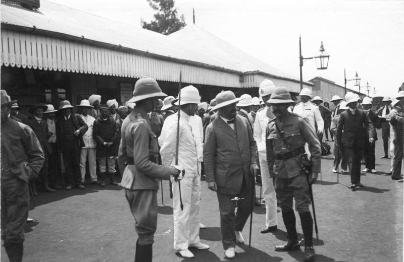 Exzellens Dernburg in Ostafrika Auf dem Bahnhof Nairobi